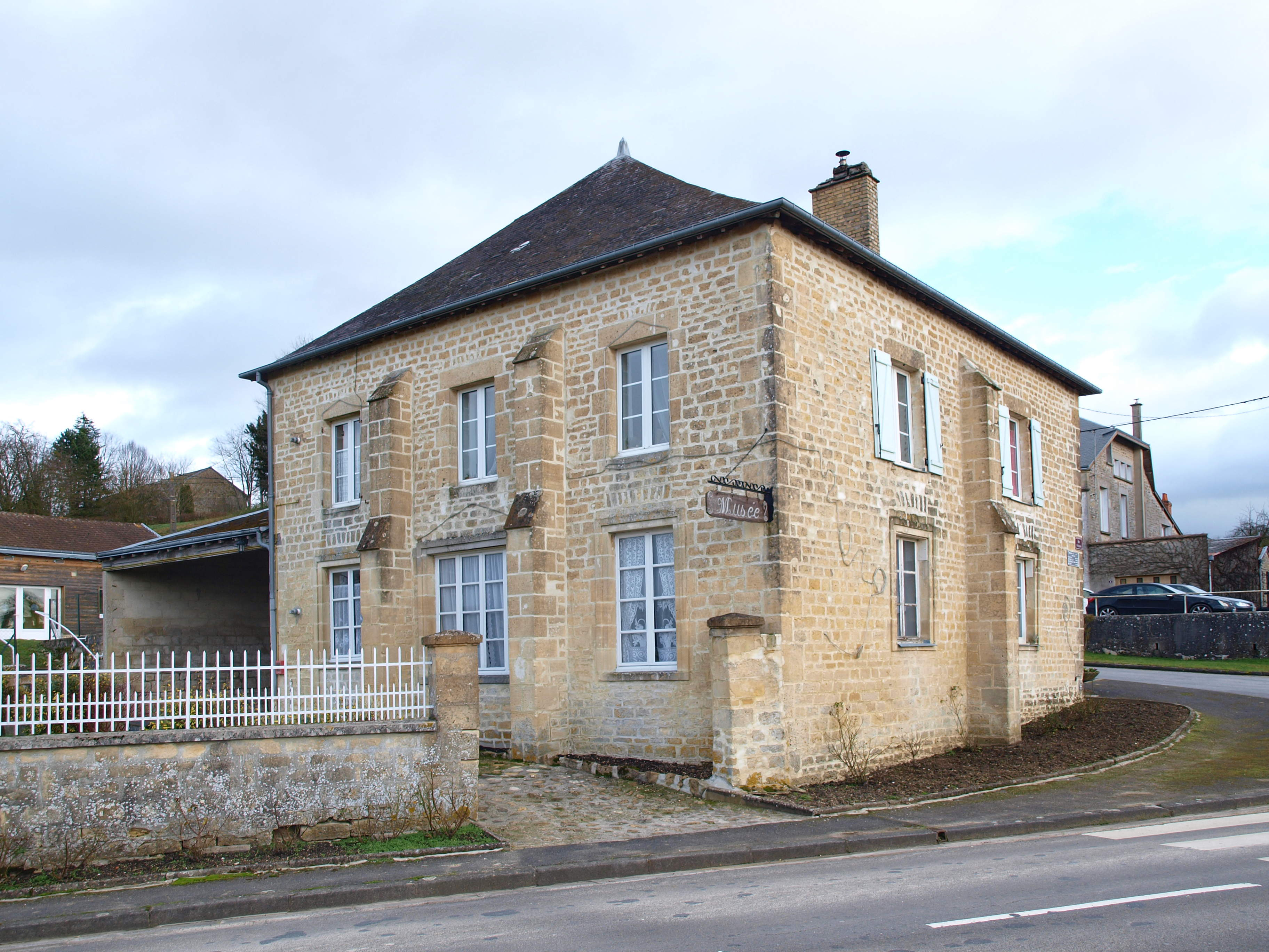 Montgon (Ardennes, France) ; mairie